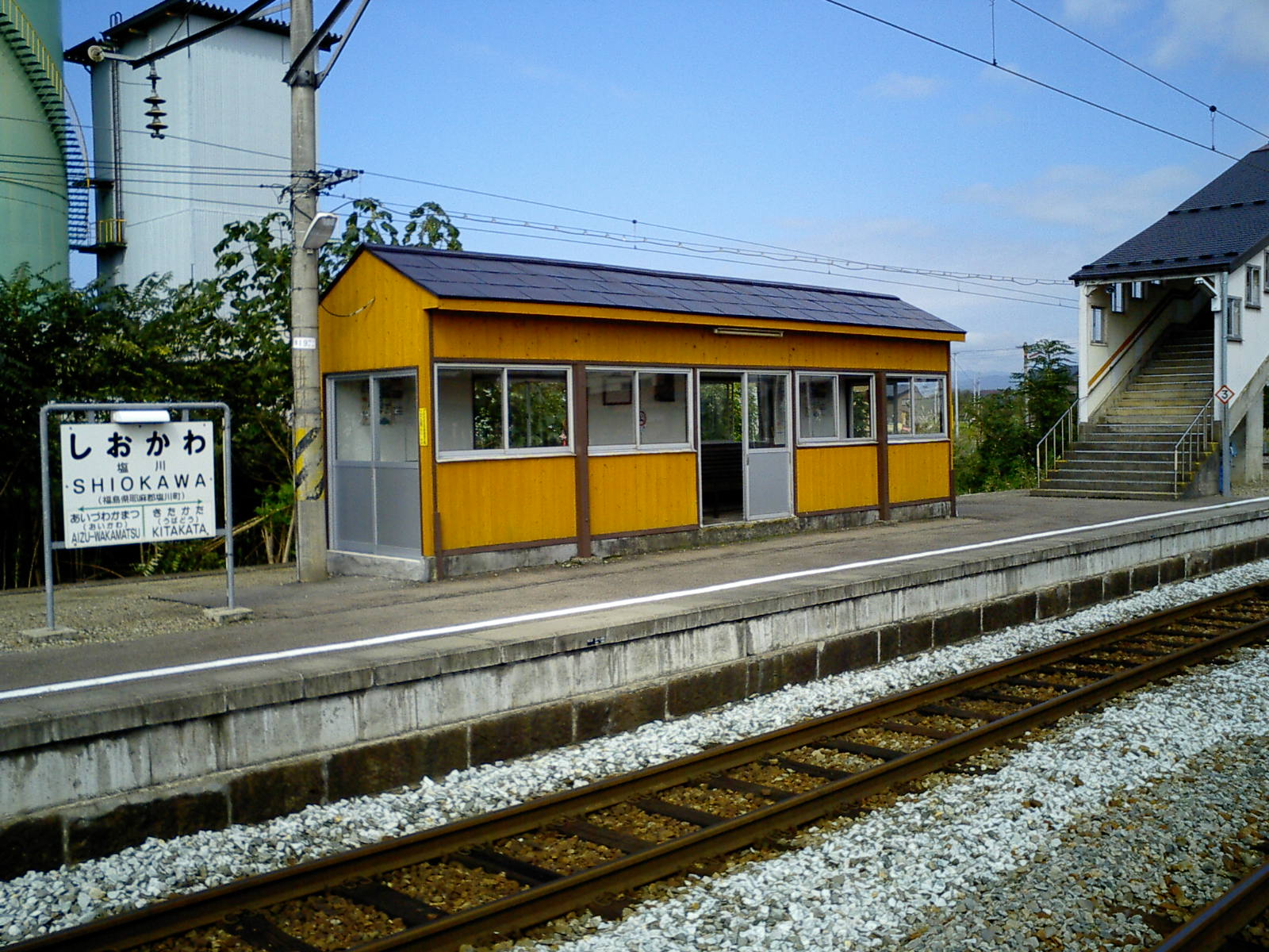 塩川駅2番線